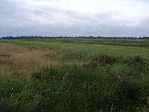 Naturschutzgebiet „Westliches Hollerland (Leherfeld)“